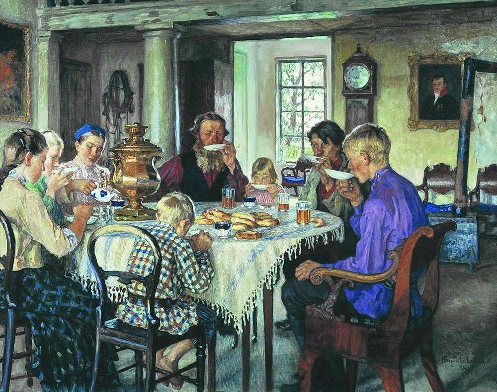 Богданов-Бельский. Новые хозяева. Чаепитие. 1913 124.2x160 Барнаул